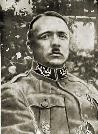 фотография А.И.Удовиченко(1887—1975) — генерал-полковника армии Украинской народной республики